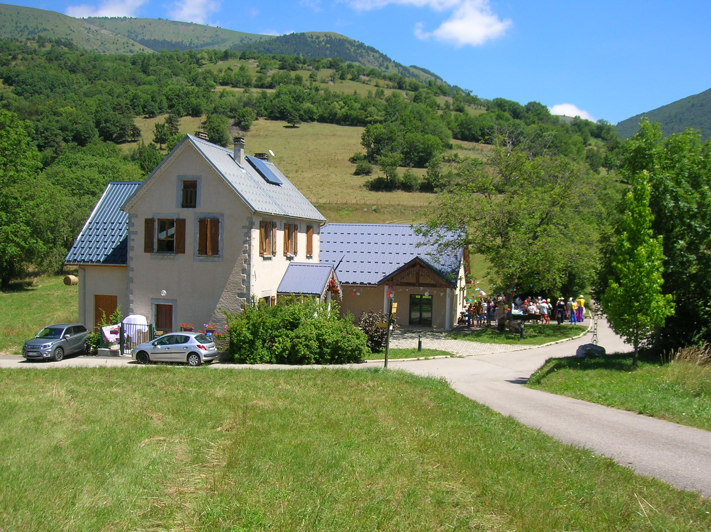 Les Côtes-de-Corps, Isère, France.